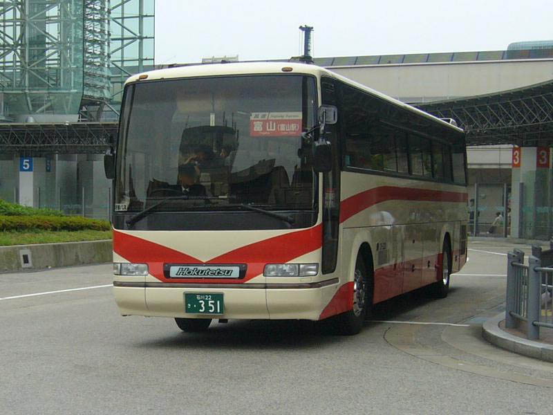 登録番号 石川200か・351 北鉄金沢中央バス所属 日野・セレガ U-RU3FSAB